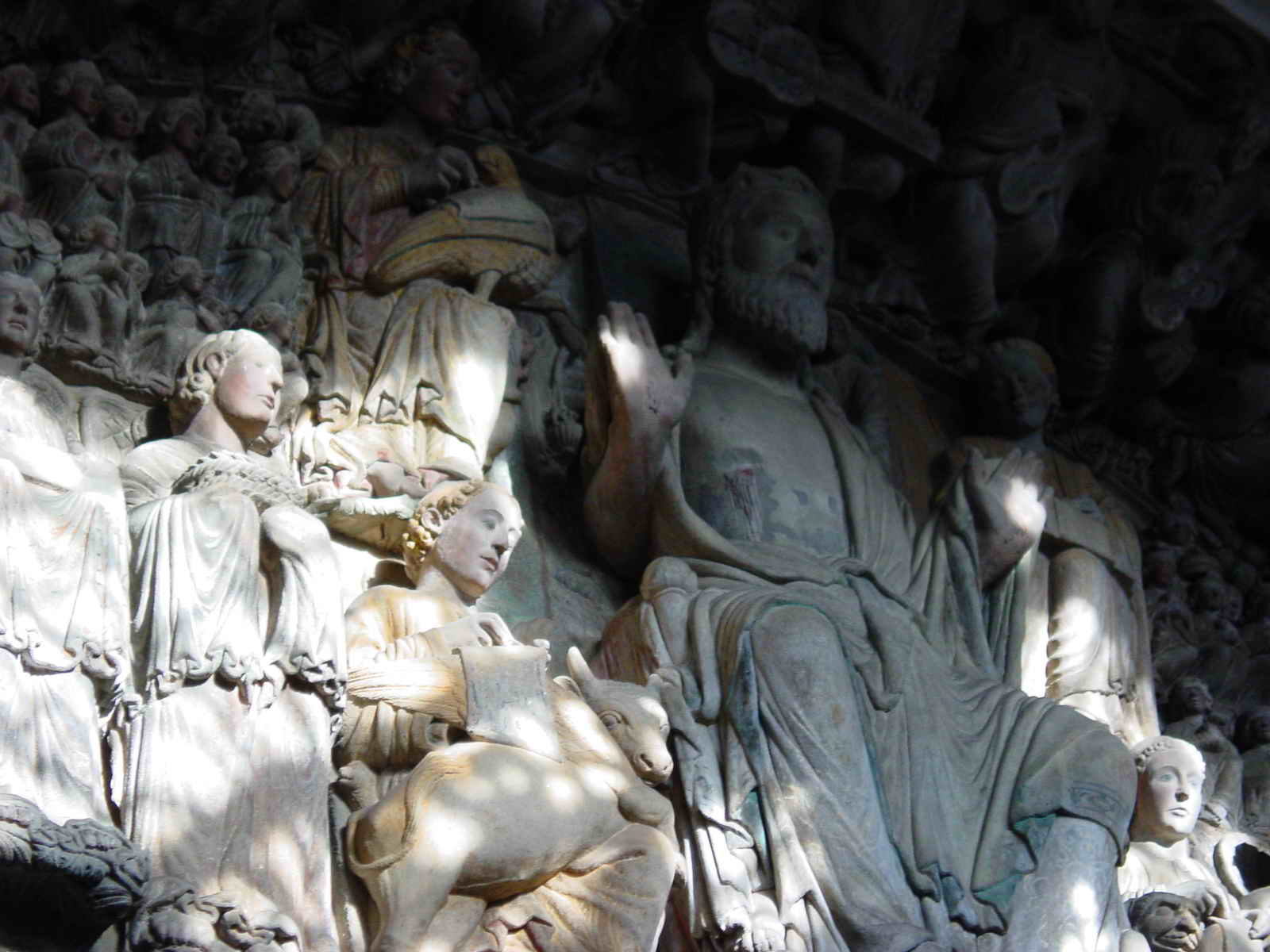 Santiago de Compostela - Galicia - España (Spain)